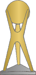 Imagen del trofeo utilizado en la Copa de Oro de Campeones Mundiales (más conocida como "Mundialito")